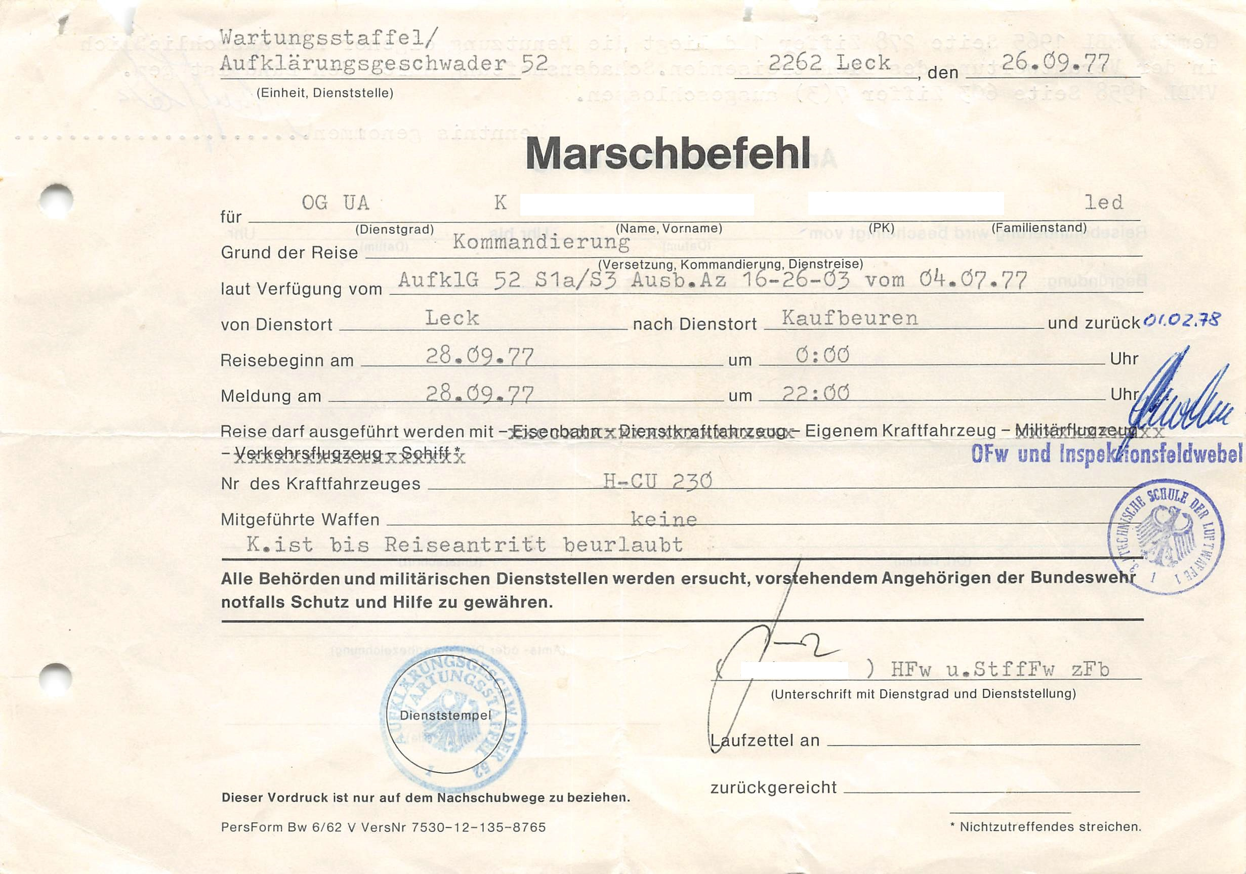 Marschbefehl der Bundeswehr 1977, Vordruck Bw 6/62V. Ausgestellt für eine Kommandierung vom Fliegerhorst Leck zur Technischen Schule der Luftwaffe in Kaufbeuren.